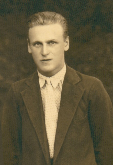 Дмитро Данилишин: Дмитро Данилишин